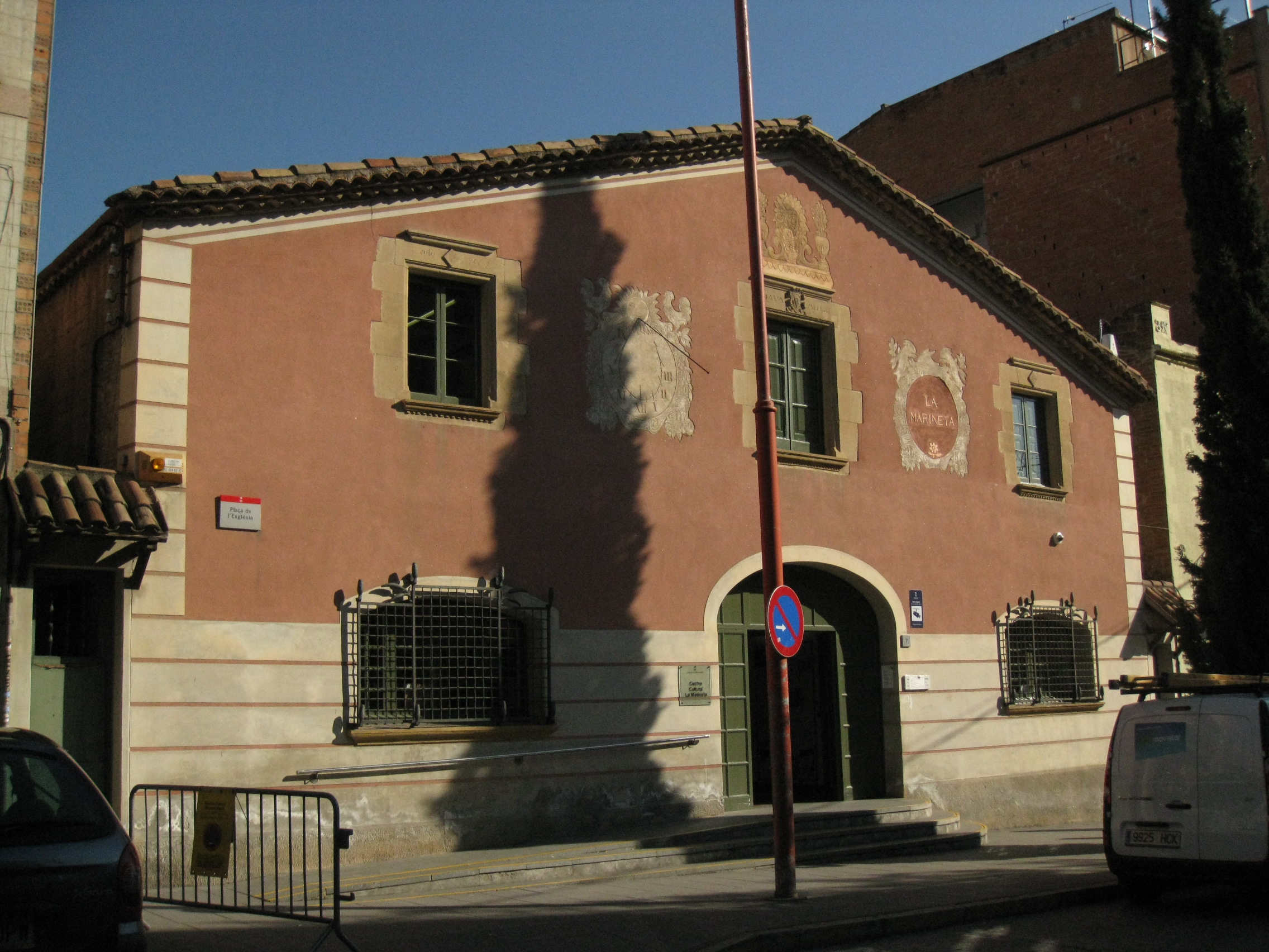 La Marineta (Mollet del Vallès)